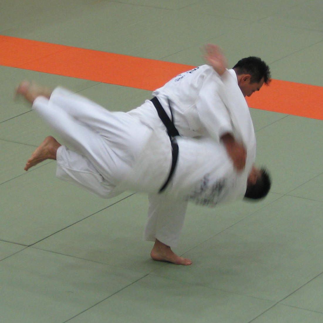 haraigoshi in Nagenokata